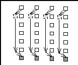 Kontermarsch (Contremarsch), Schützenwechsel der Arkebusiere / Musketiere